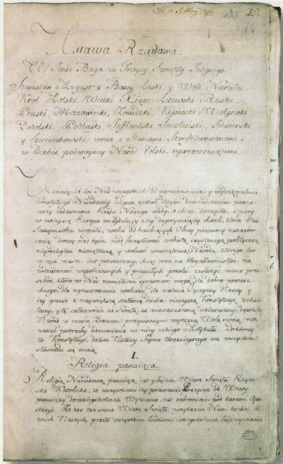 Rękopis Konstytucji 3 maja zawarty w Archiwum Potockich